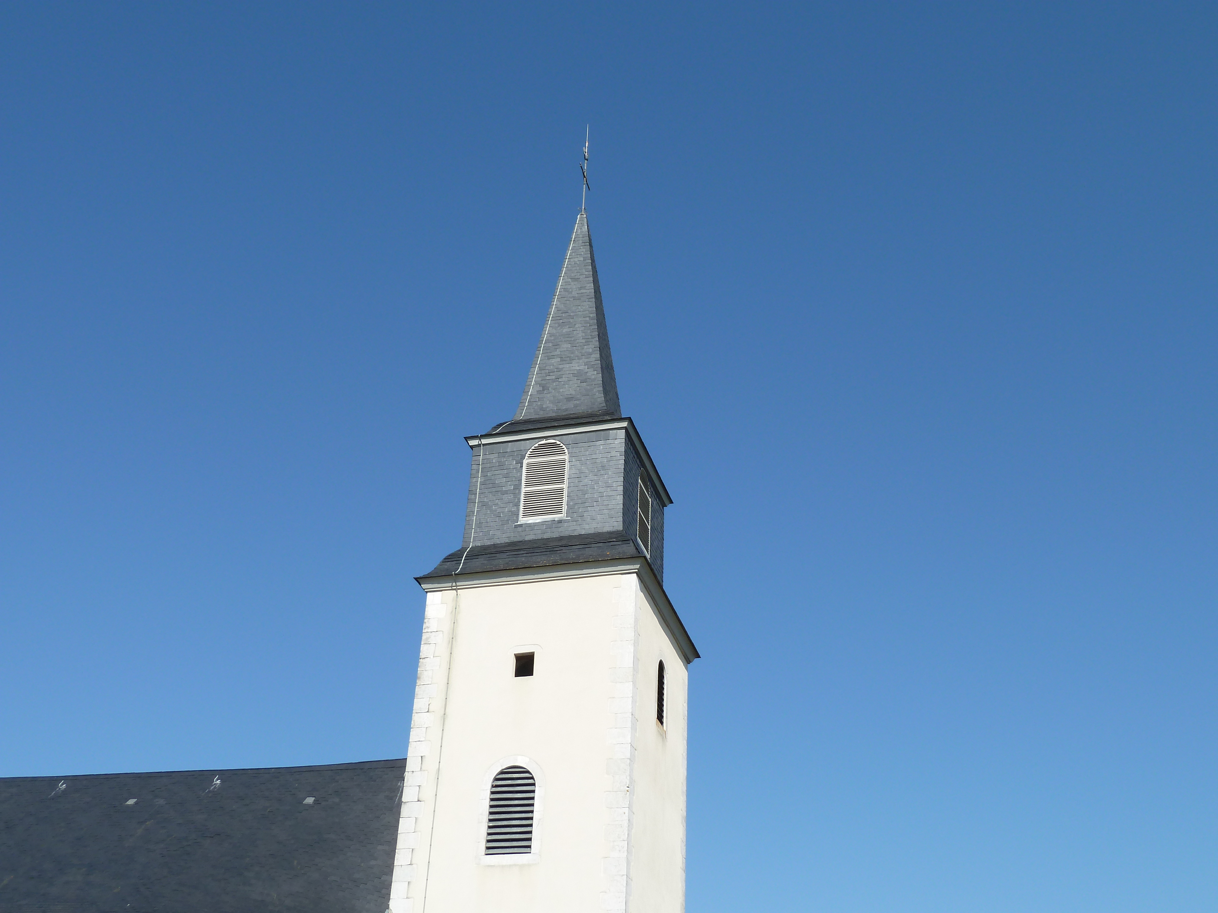 Clocher de l'église de Loubieng